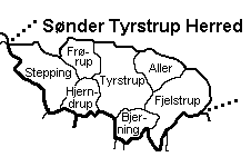 Als Nørre Herred, Sønderborg Amt, Danmark.